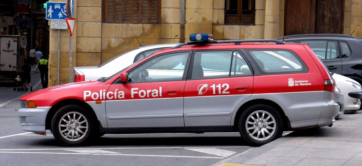 Vehículo de la Policía Foral de Navarra, estacionado frente al Palacio de Navarra (Gobierno autonómico), en Pamplona